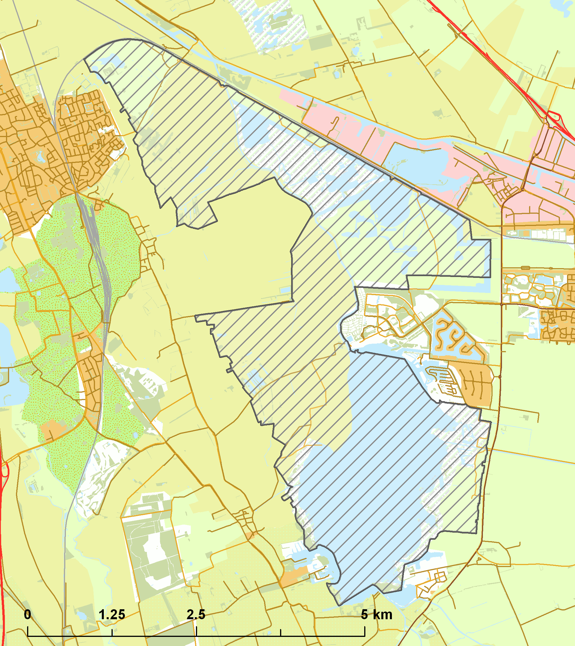 Natura2000 - Zuidlaardermeergebied.png